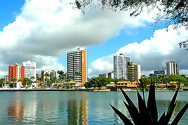 Açude Velho, Campina Grande, Paraíba - Brasil.